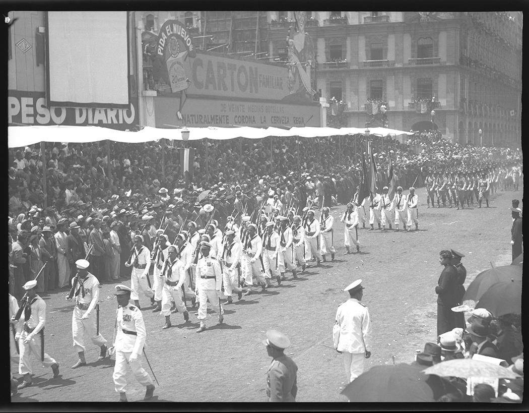 Fotografía antigua de la Ciudad de México resguardadas por el Museo Archivo de la Fotografía (MAF) de la Ciudad de México.